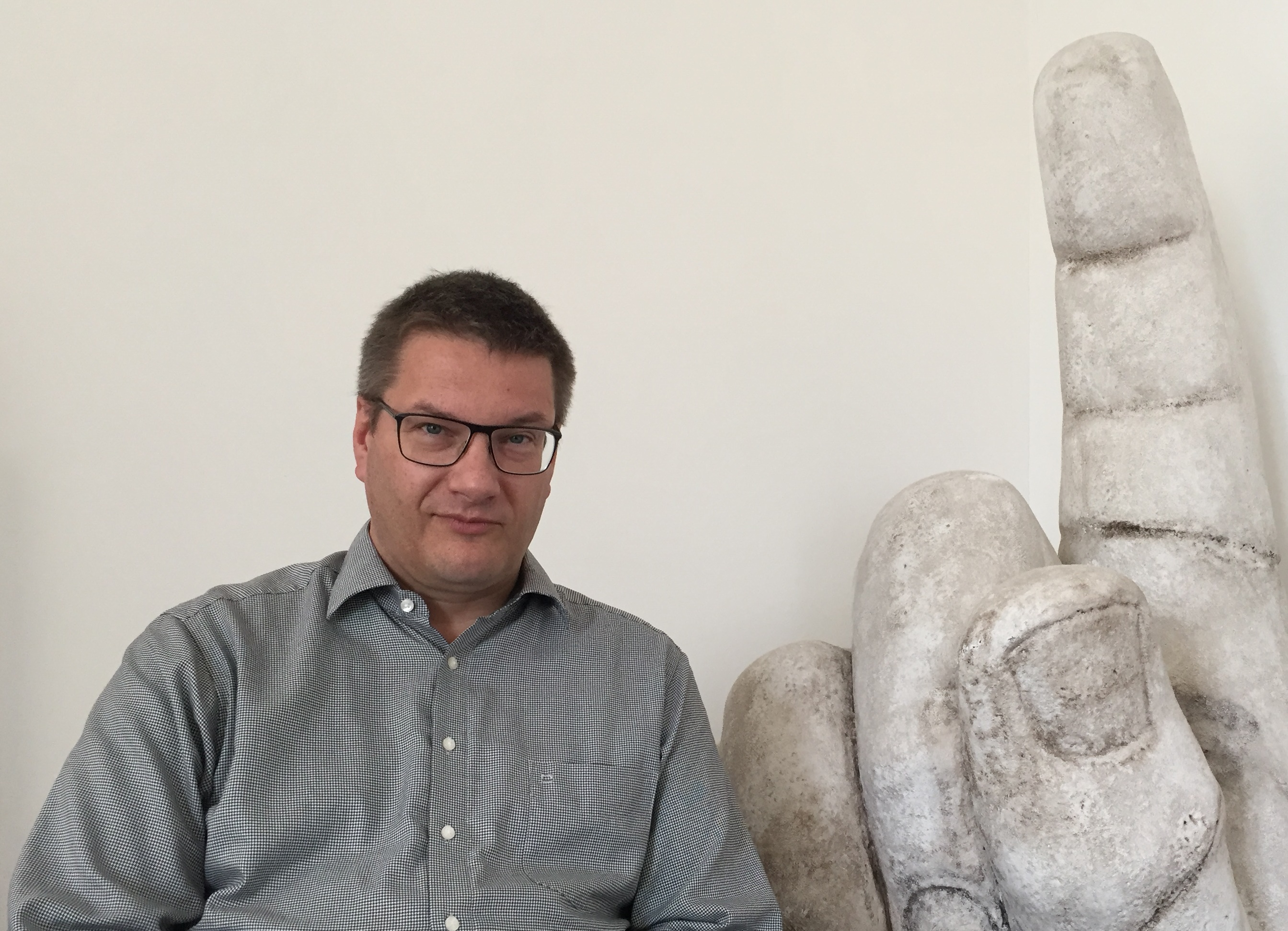 Prof. Dr. Eckart Köhne